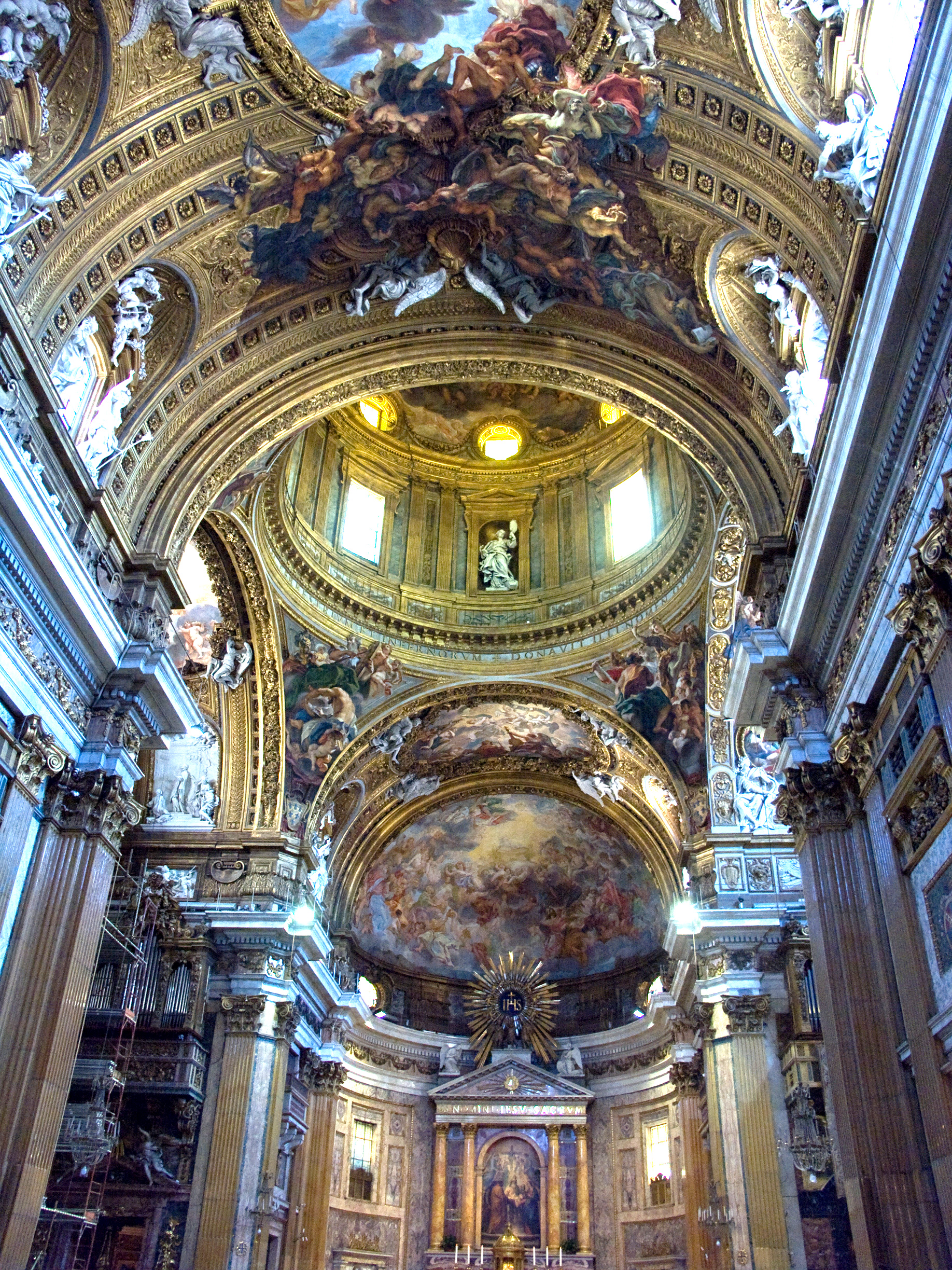 Rome, Église du Gesù, Intérieur